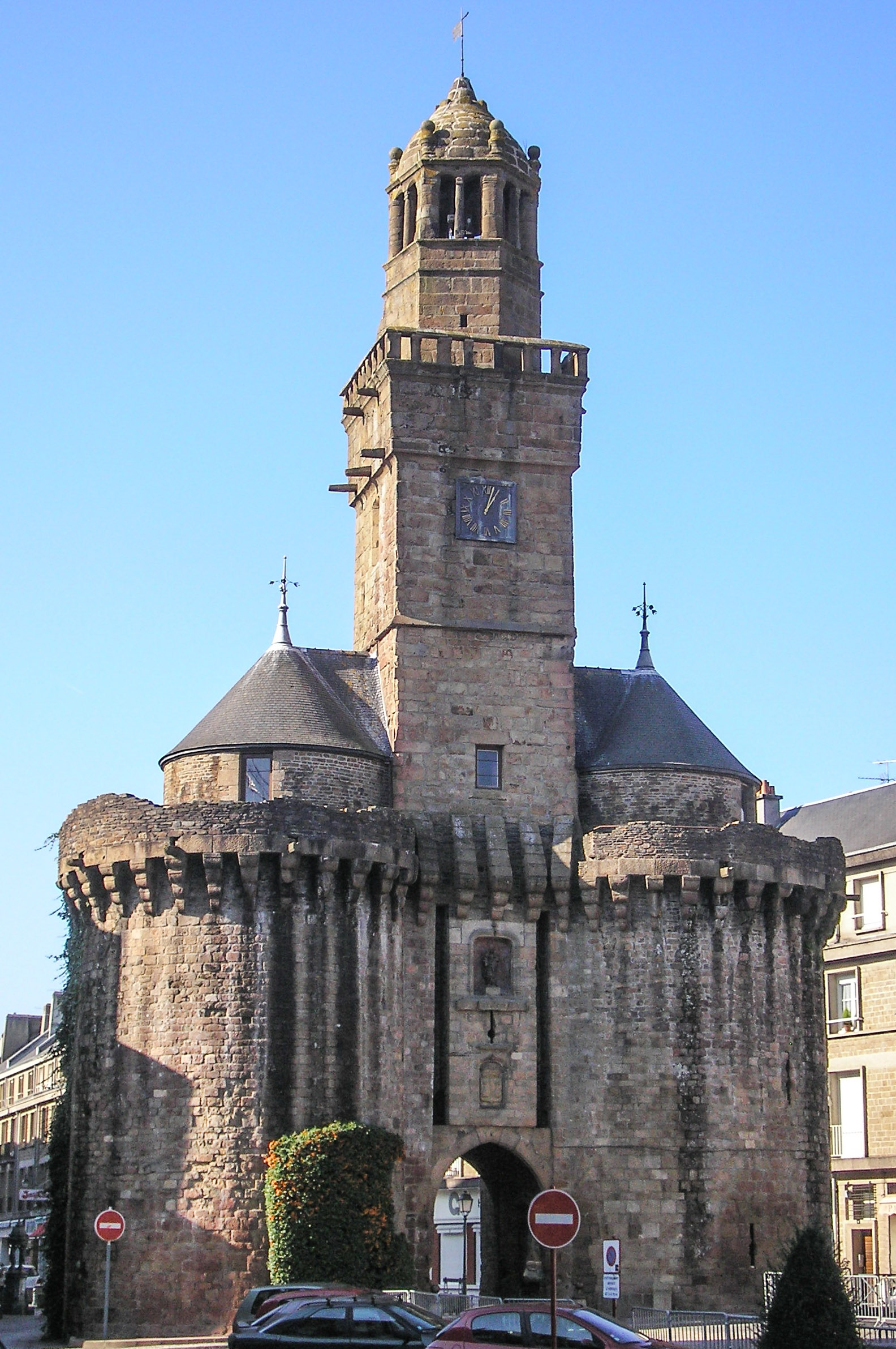 Vire (Normandie, France). La Porte-Horloge.